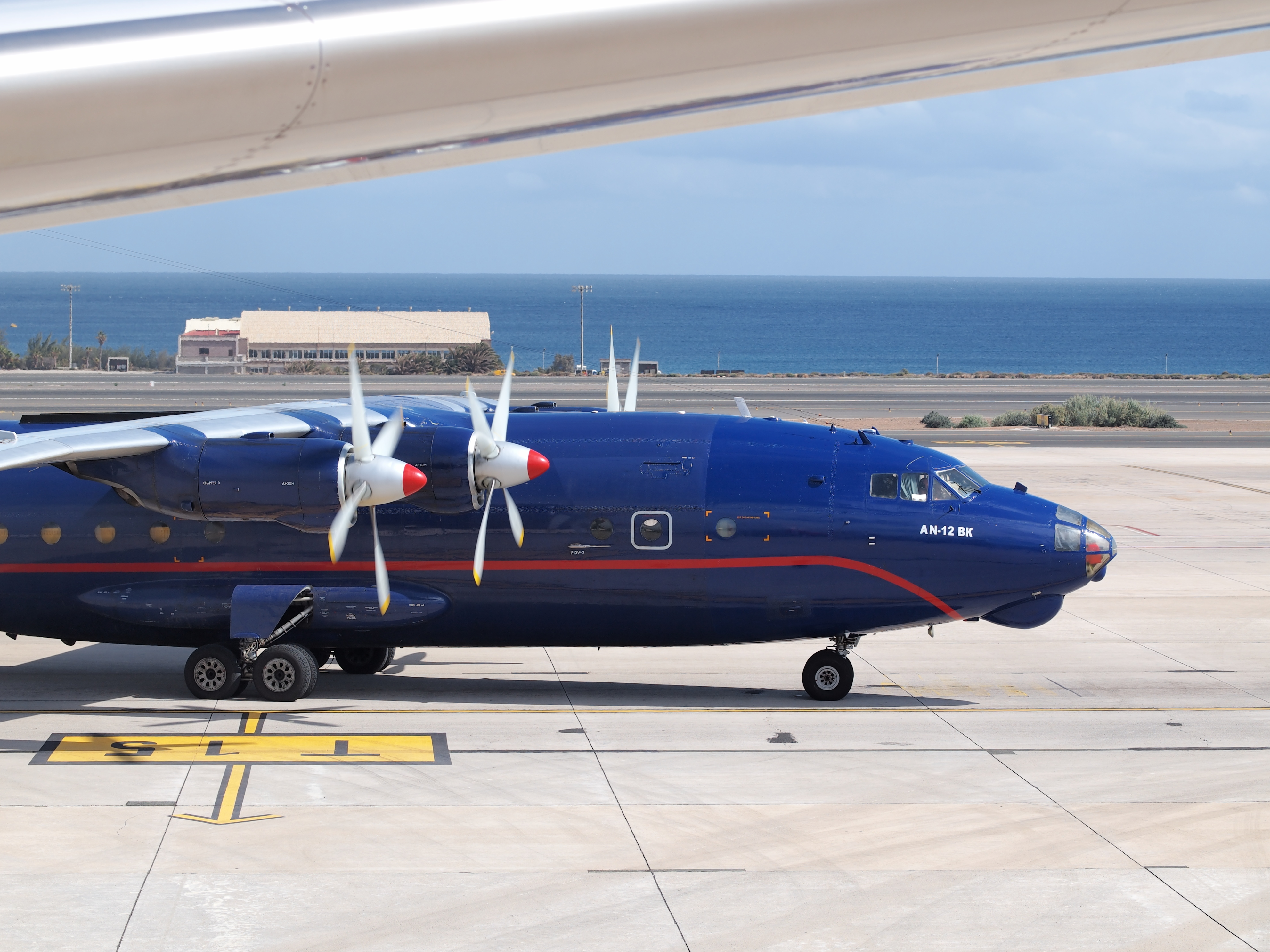 Antonov AN-12 BK UR-CGV at Gran Canaria Airport